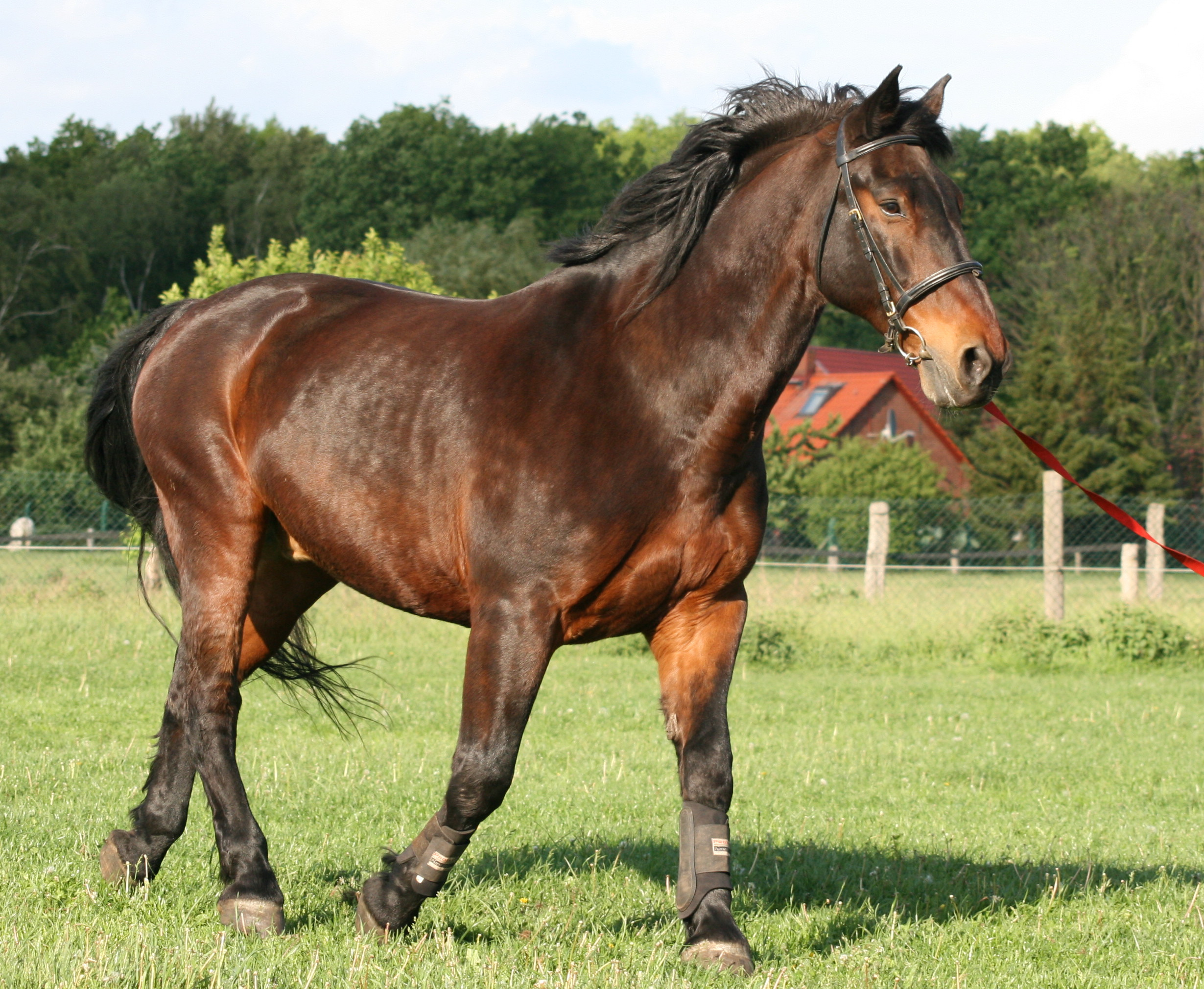 Lettisches Warmblut "Jards", Wallach, 21 Jahre.